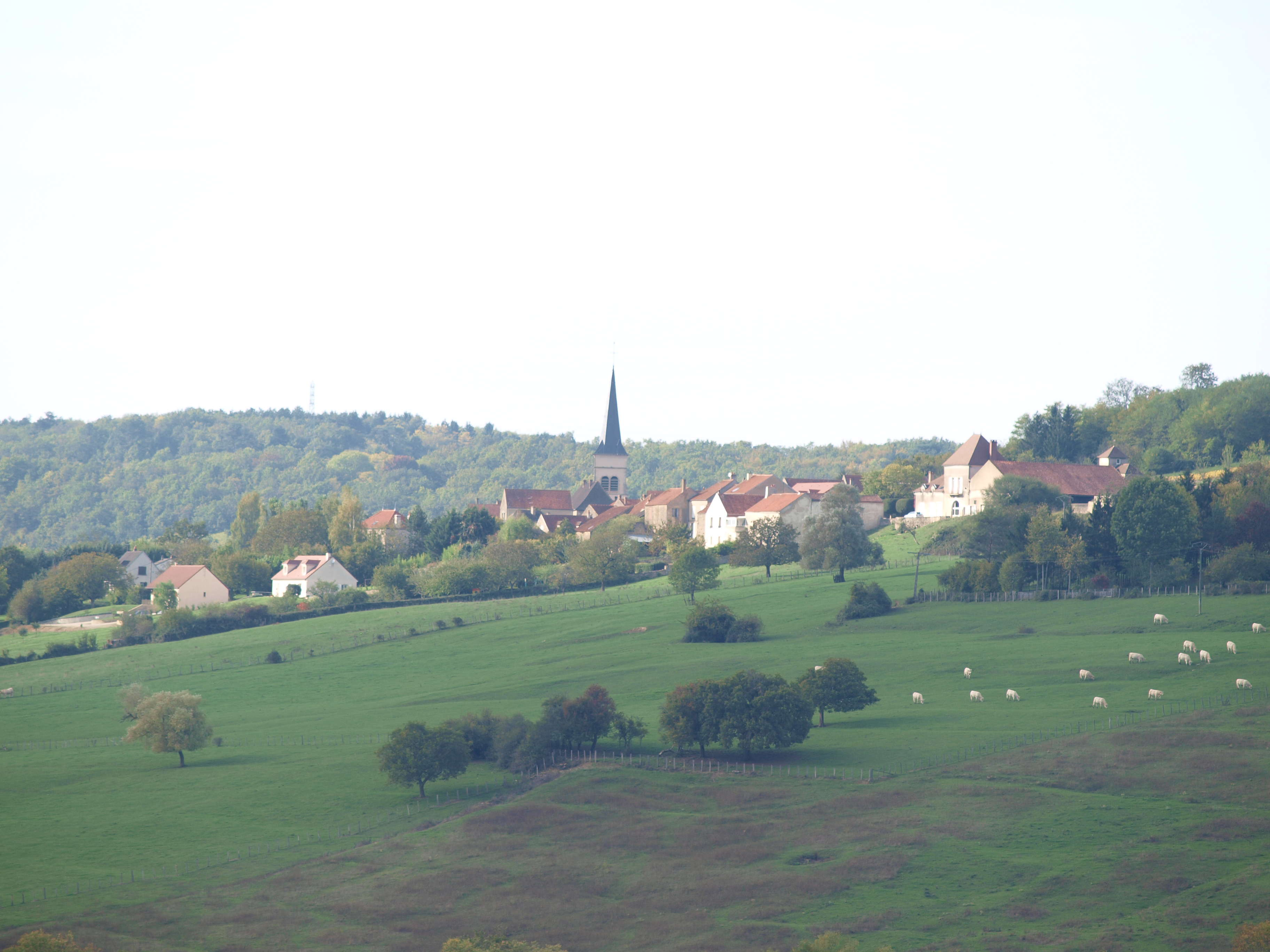 Annay-la-Côte (Yonne, France) ; vue générale depuis le VI 50 entre Etaule & Wassy.